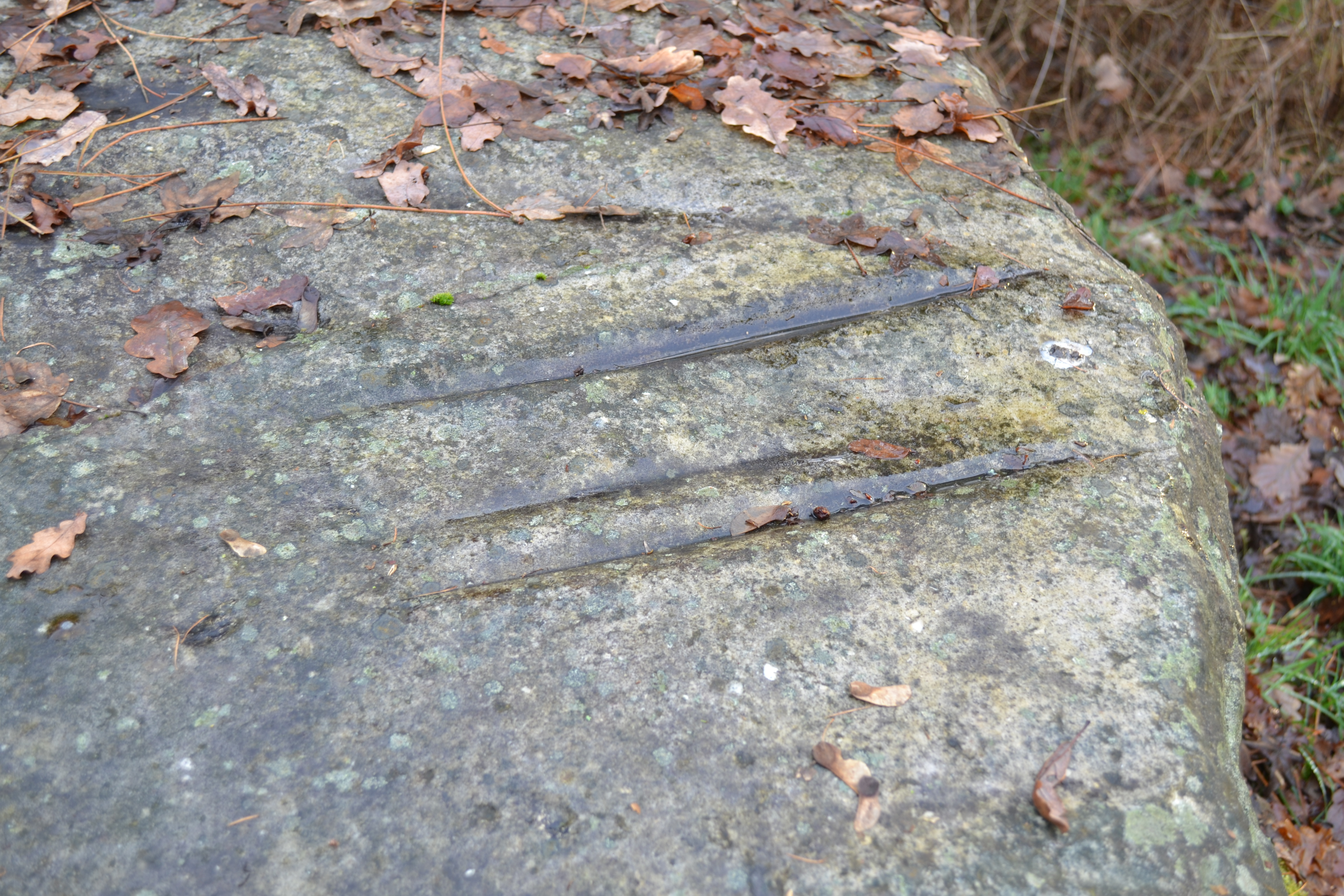 Allée couverte de Pontpiau à Champtocé / Loire. Table de couverture utilisée en polissoir.